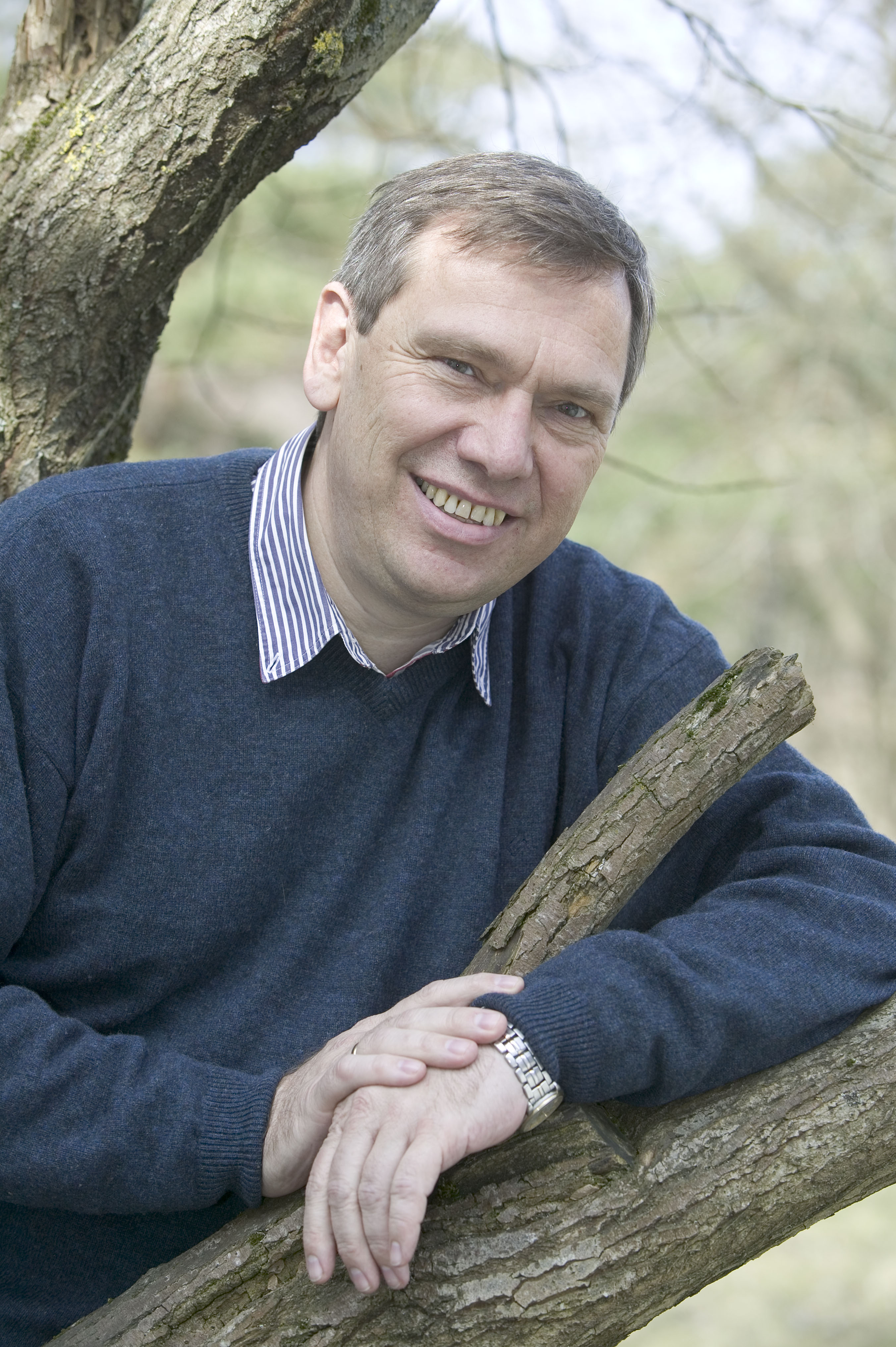 Jon Jæger Gåsvatn